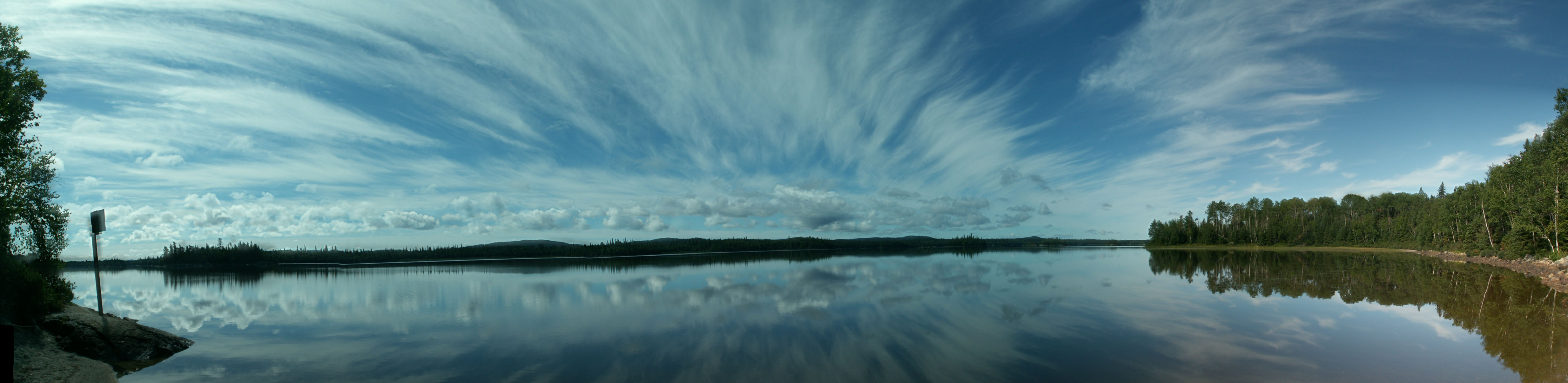 Vue panoramique du Lac Loïs, parc national d'Aiguebelle